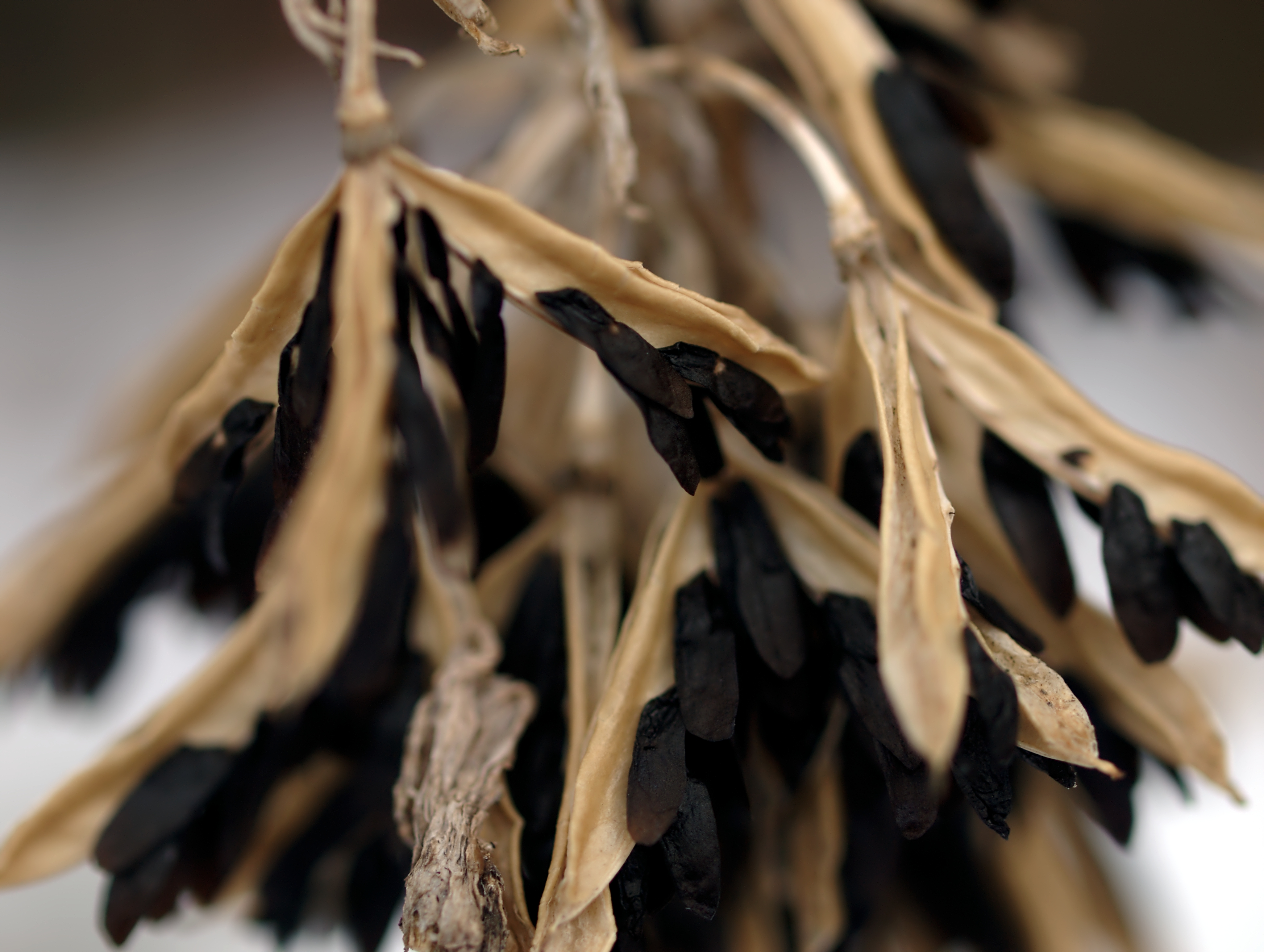 Hosta Seedpods (Brackenridge, PA)